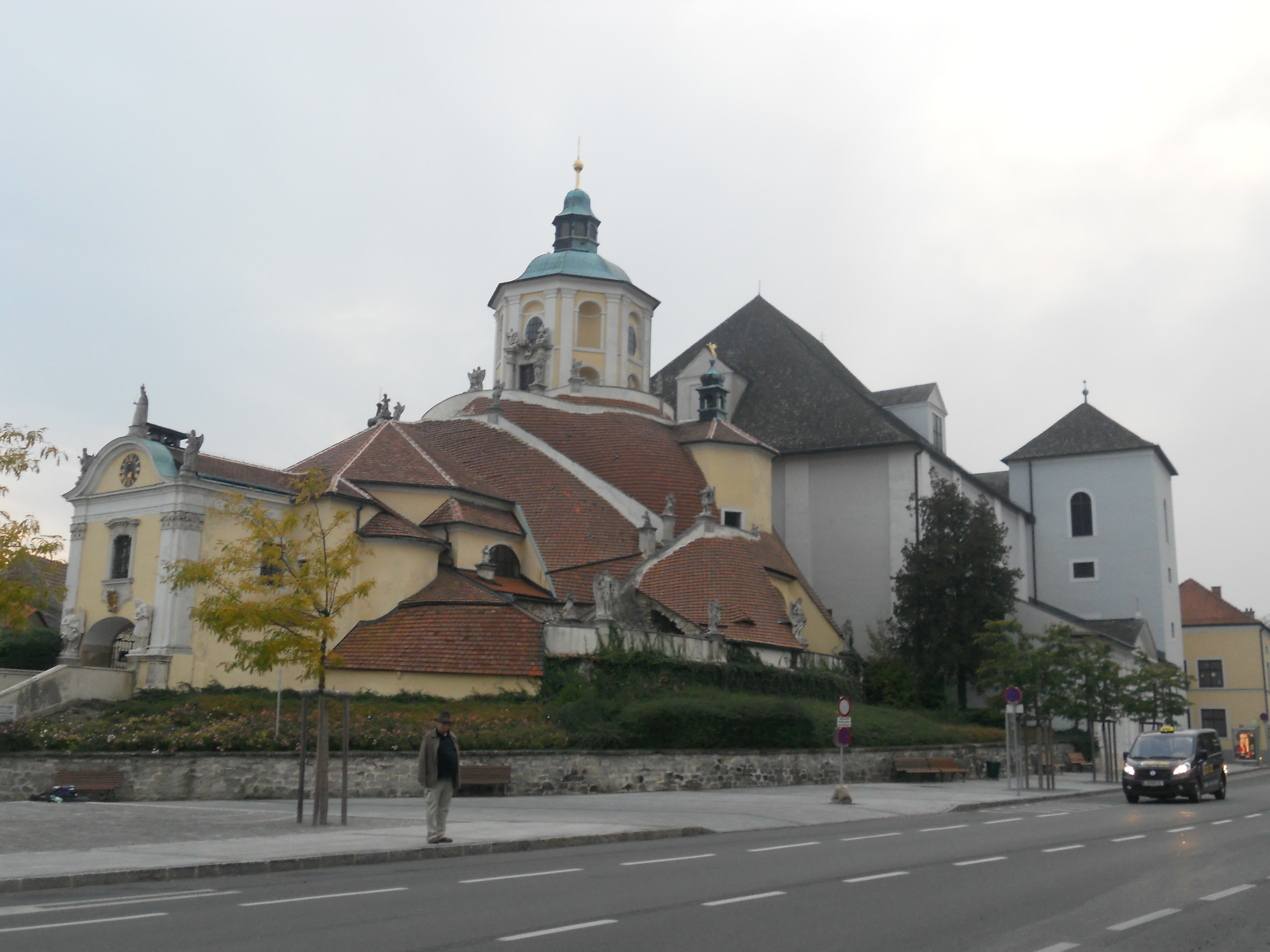 Gesamtansicht der Bergkirche in Eisenstadt mit dem Kalvarienberg (links)